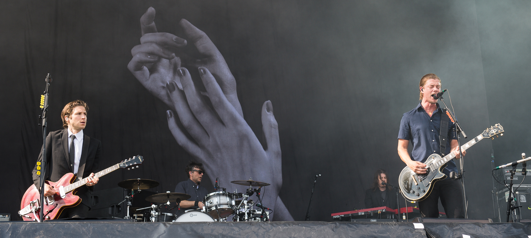 ARGO-Konzerte,Brandon Curtis,Daniel Kessler,Festival,Interpol,Konzert,Livekonzert,Livemusik,Musik,Paul Banks,RiP,Rock im Park 2015,Samuel "Sam" Fogarino,Seat Zeppelin Stage